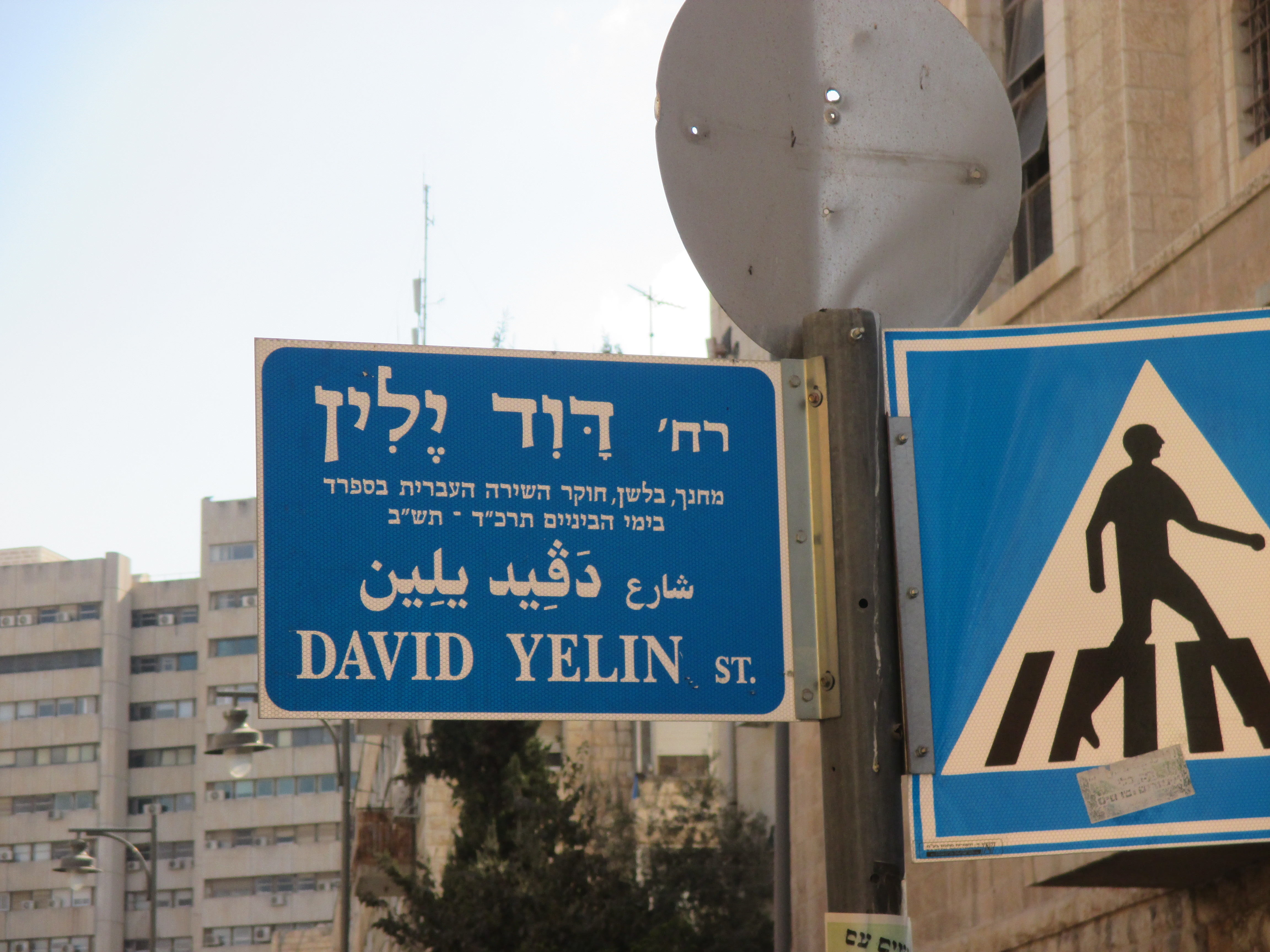 רחוב על שם דוד ילין בסמוך לכיכר הדוידקה בירושלים